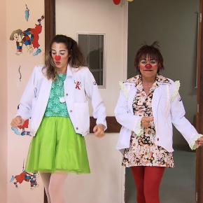 Doutores da Alegria em imagem do acervo da TV Brasil.